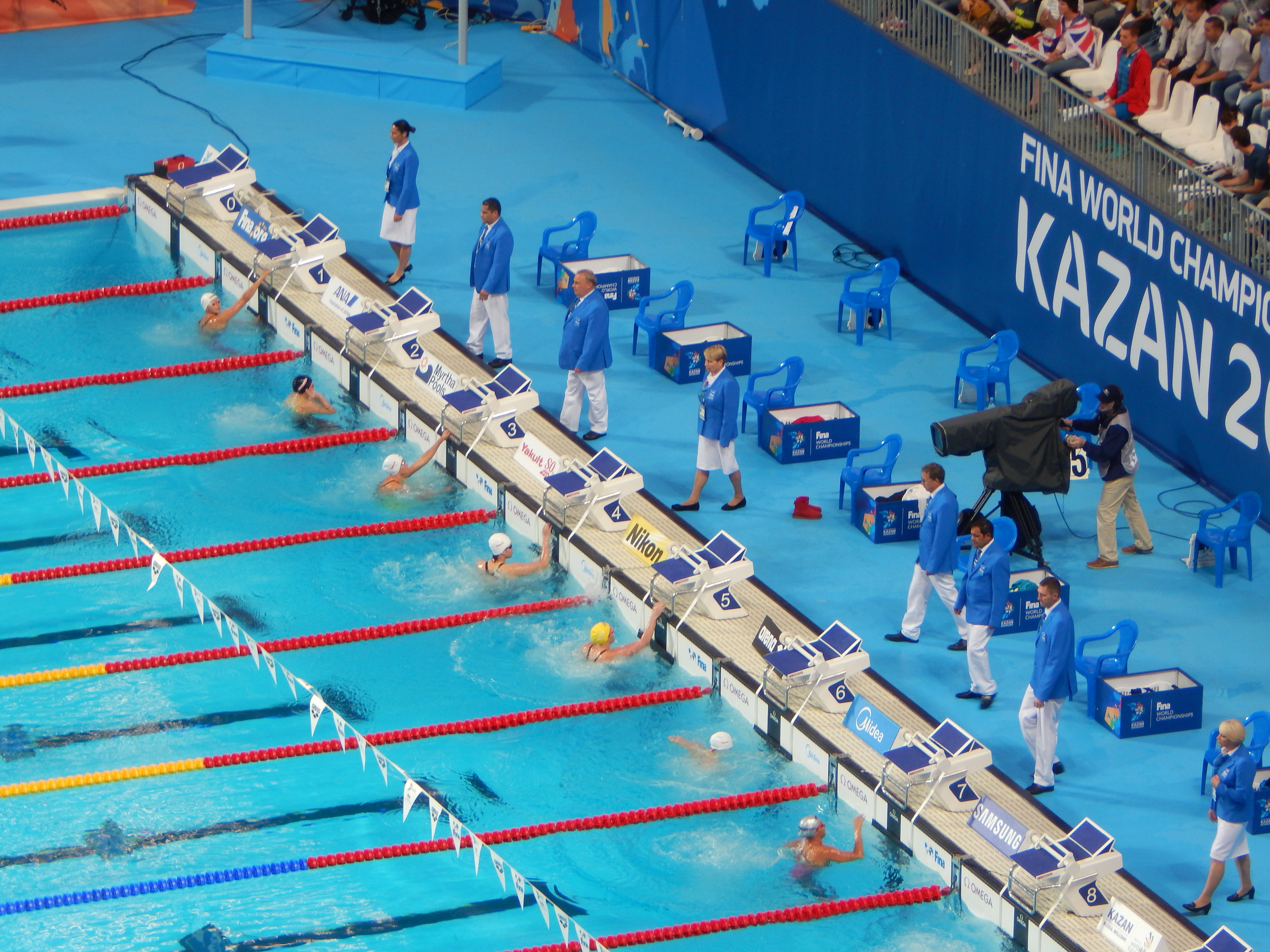 Старт второго полуфинала на дистанции 50 метров на спине у женщин в Казани на ЧМ